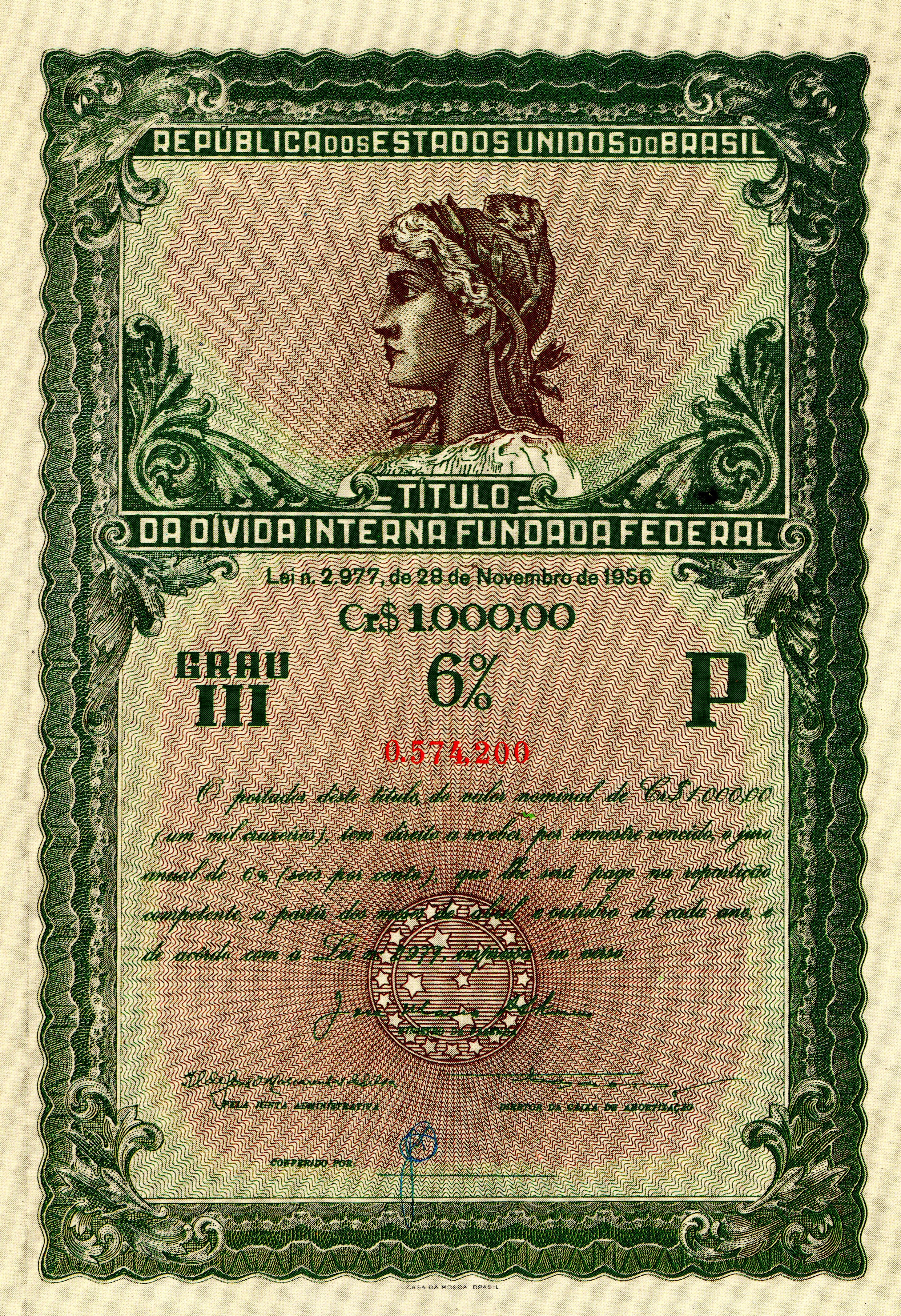 Apólice brasileira da antiga Caixa de Amortização. Te a assinatura de José Maria Alkmin, como Ministro da Fazenda